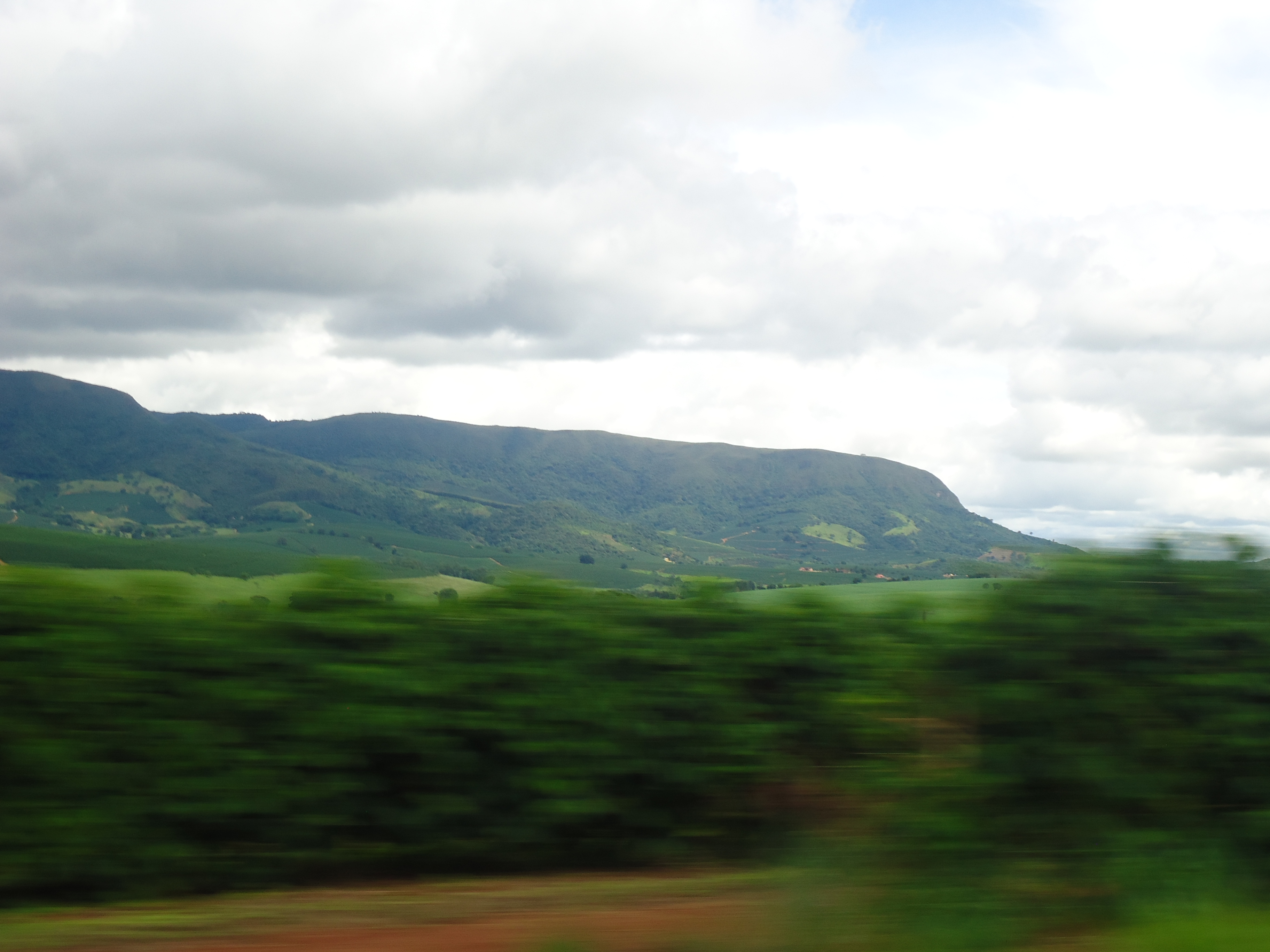 Vista da parte sul da Serra da Boa Esperança